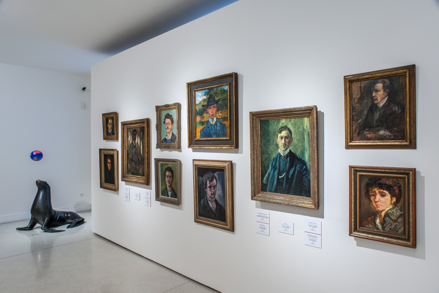 Pražákův palác ART IS HERE: Moderní umění